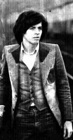 Italian singer Claudio Baglioni